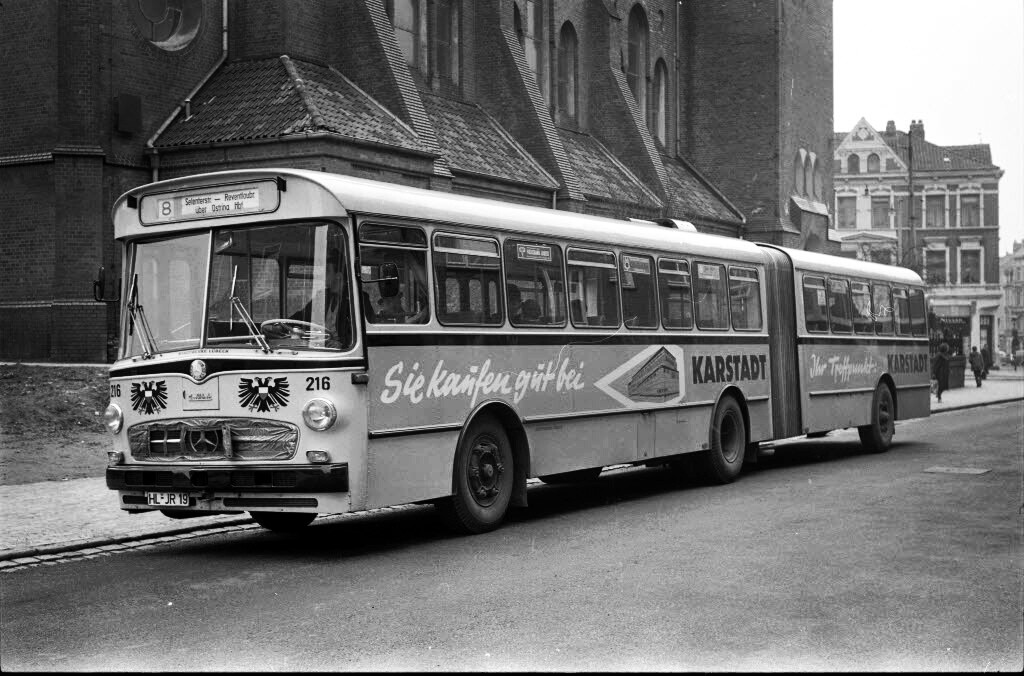 Die Kieler Verkehrs-AG (KVAG) hat den neuen Gelenkbus, im Bild in der Waitzstraße, von den Stadtwerken der Hansestadt Lübeck probeweise bekommen, um ihn auf der Omnibuslinie 8 (Selenter Straße - Reventloubrücke) zu testen.